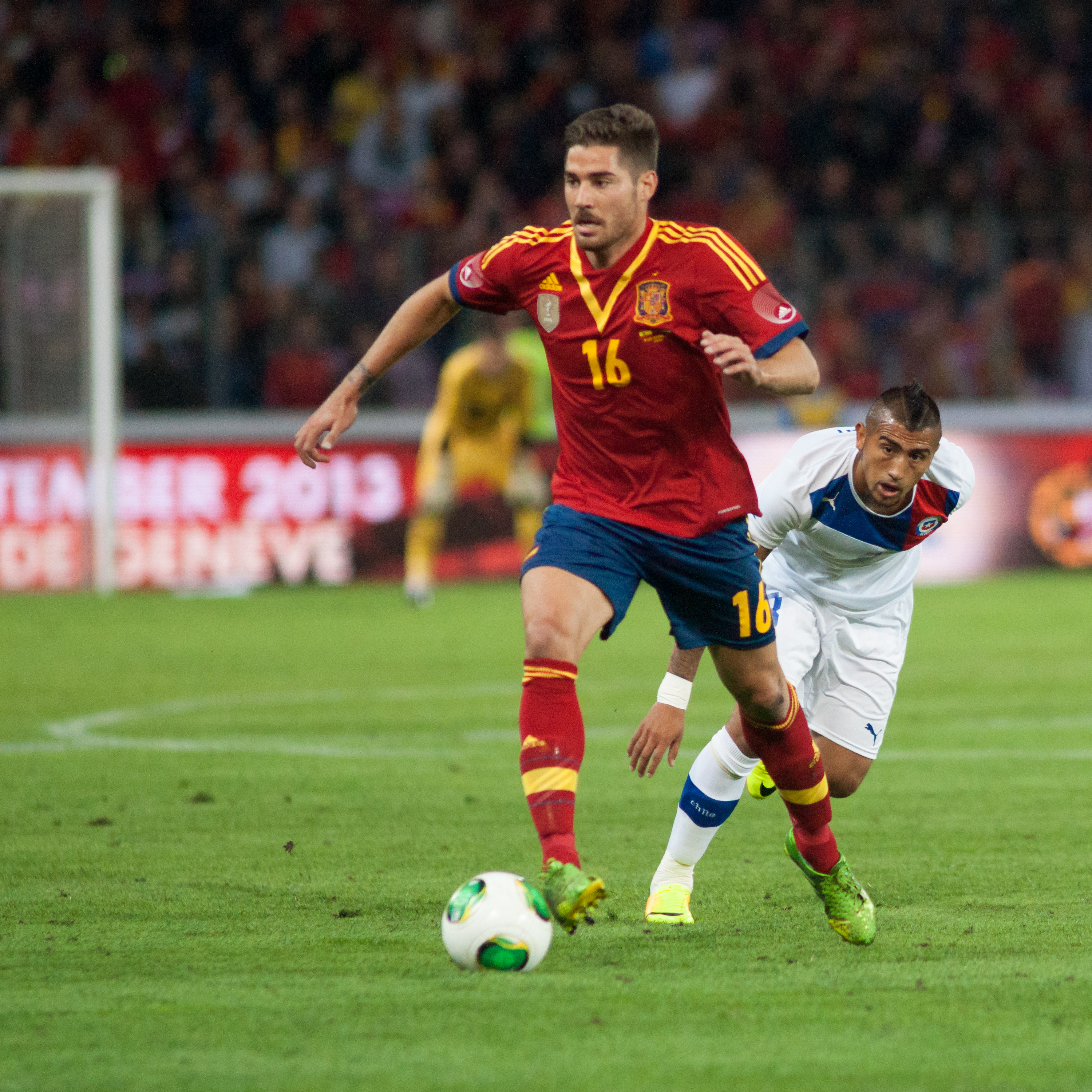 Espagne - Chili, 10 septembre 2013.